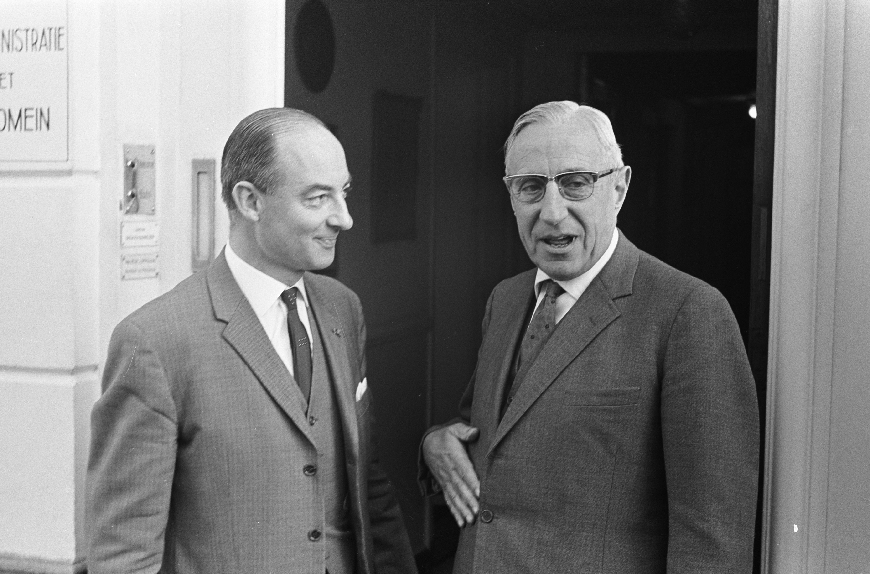 Collectie / Archief : Fotocollectie Anefo Reportage / Serie : Kabinetscrisis 1966: De nacht van Schmelzer Beschrijving : Dr. J.E. (Jan) de Quay (KVP) arriveert bij het huis van Drs. W.K.N. (Norbert) Schmelzer (KVP) Datum : 25 oktober 1966 Locatie : Den Haag, Zuid-Holland Trefwoorden : kabinetscrises, parlementariërs, politiek Persoonsnaam : Quay, Jan E. de, Schmelzer, W.K.N. (Norbert) Fotograaf : Fotograaf Onbekend / Anefo Auteursrechthebbende : Nationaal Archief Materiaalsoort : Negatief (zwart/wit) Nummer archiefinventaris : bekijk toegang 2.24.01.05 Bestanddeelnummer : 919-7178